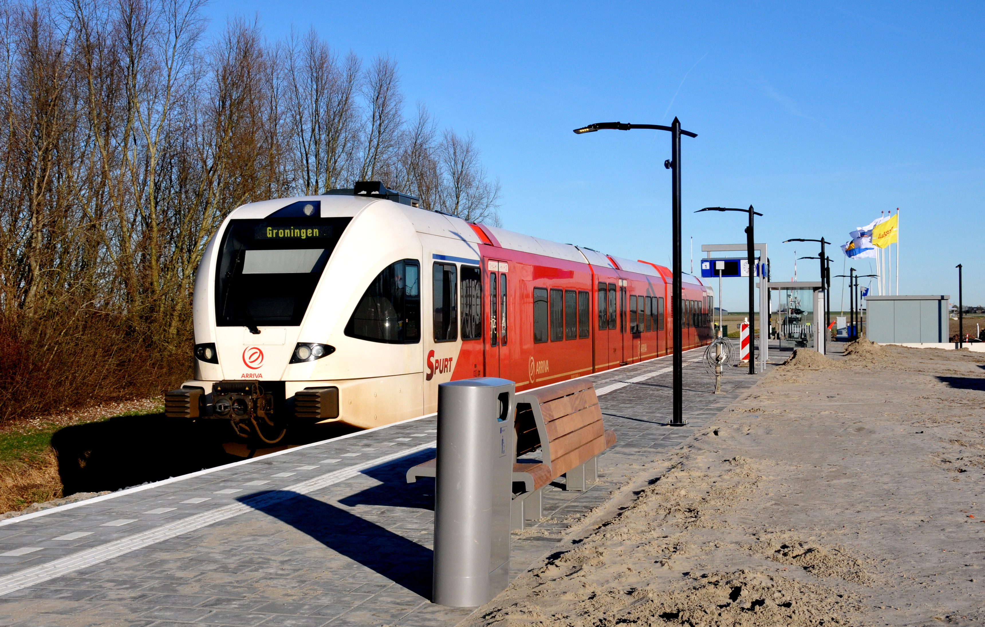 Station Roodeschool aan de Hooilandseweg ingebruik.